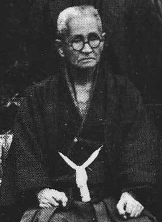 喜屋武朝徳 (Kyan Chotoku, 1870-1945)